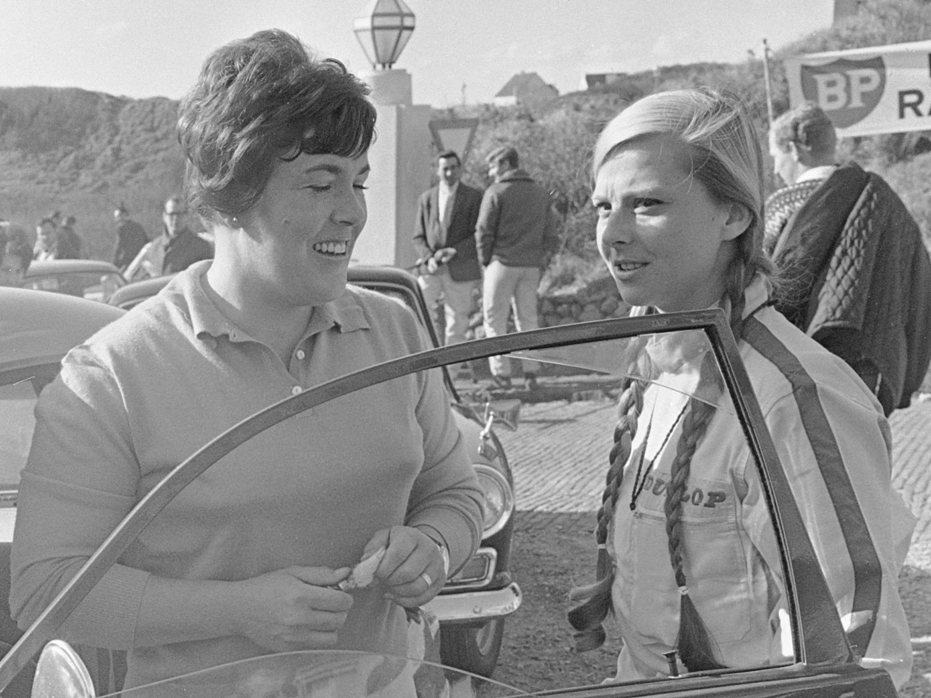 Start Tulpenralley 1967 te Noordwijk, de dames Pat Carlsson (l) en Elisabeth Nystrom in een Saab 24 april 1967